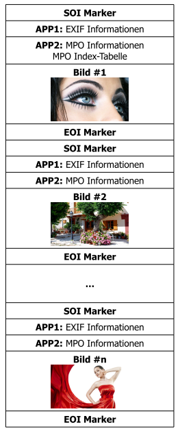 Aufbau einer typischen MPO Datei (Photographien bereitgestellt durch Fa. Burosch Audio-Video-Technik, burosch.de).